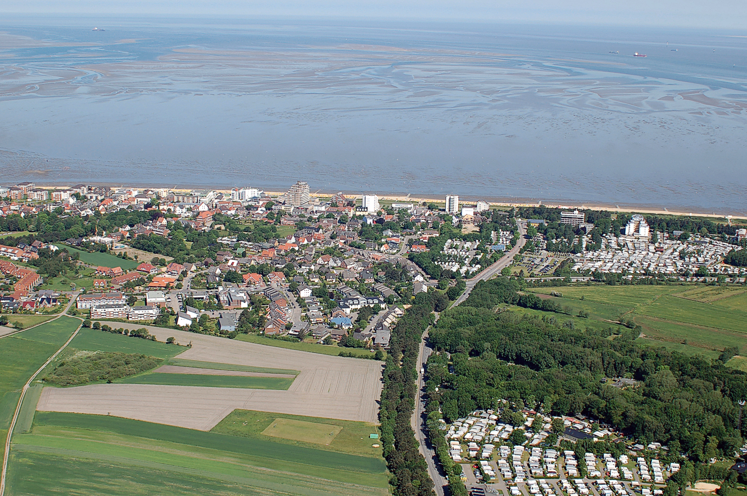 Cuxhaven-Duhnen. Die senkrecht durchs Bild verlaufende Straße ist die Duhner Allee.